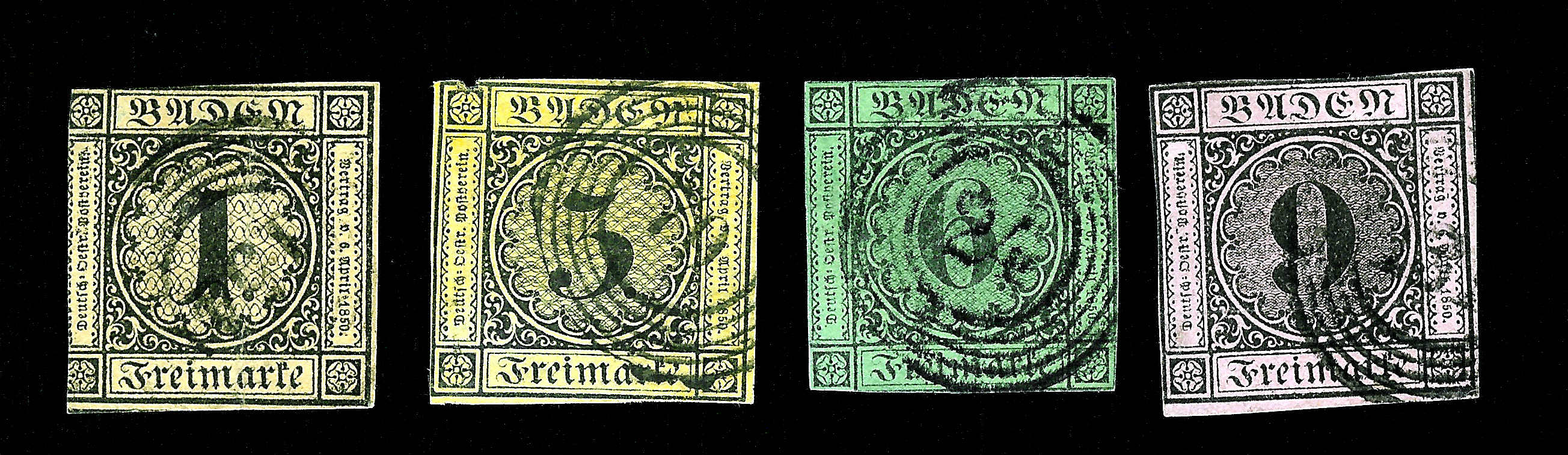 Erstellt von Martin Dürrschnabel Die ersten Briefmarken von Baden aus dem Jahre 1851.